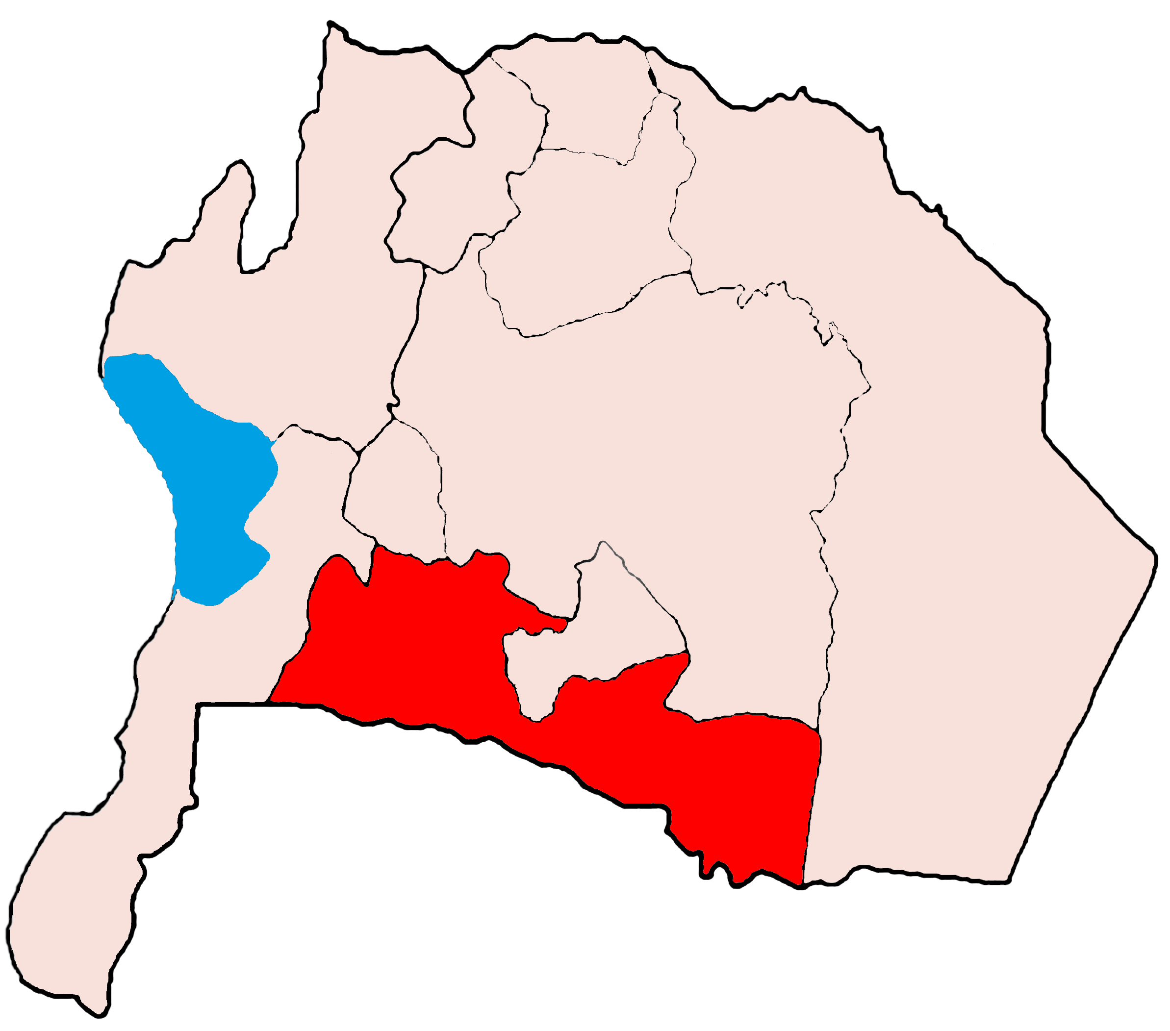 Maps of Karak — Karak-Mazar Ganobi User:Tarawneh/rami